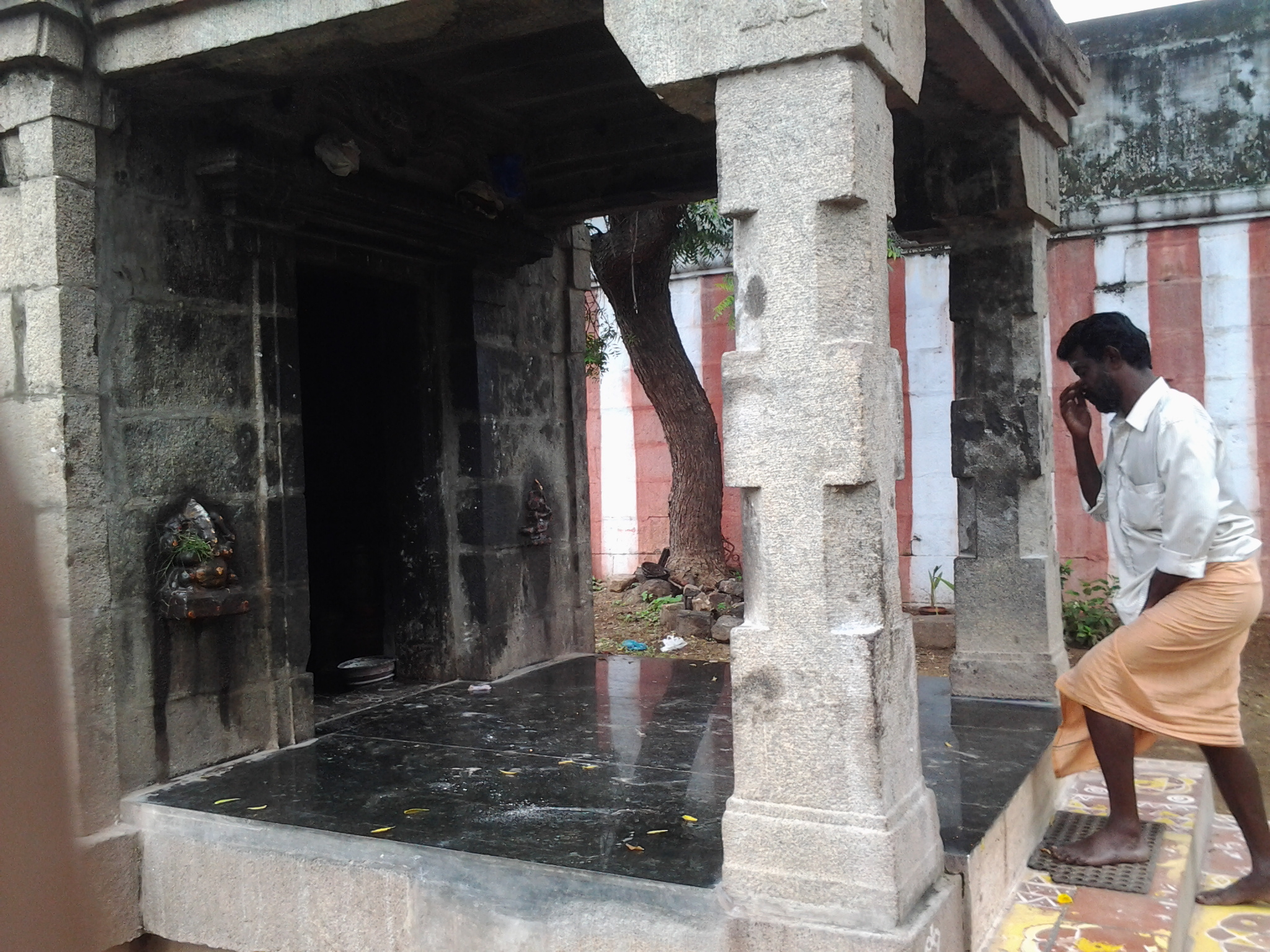 தென்காசி பாண்டியர்களின் குல குருவான விந்தையர் சித்தரின் சமாதி